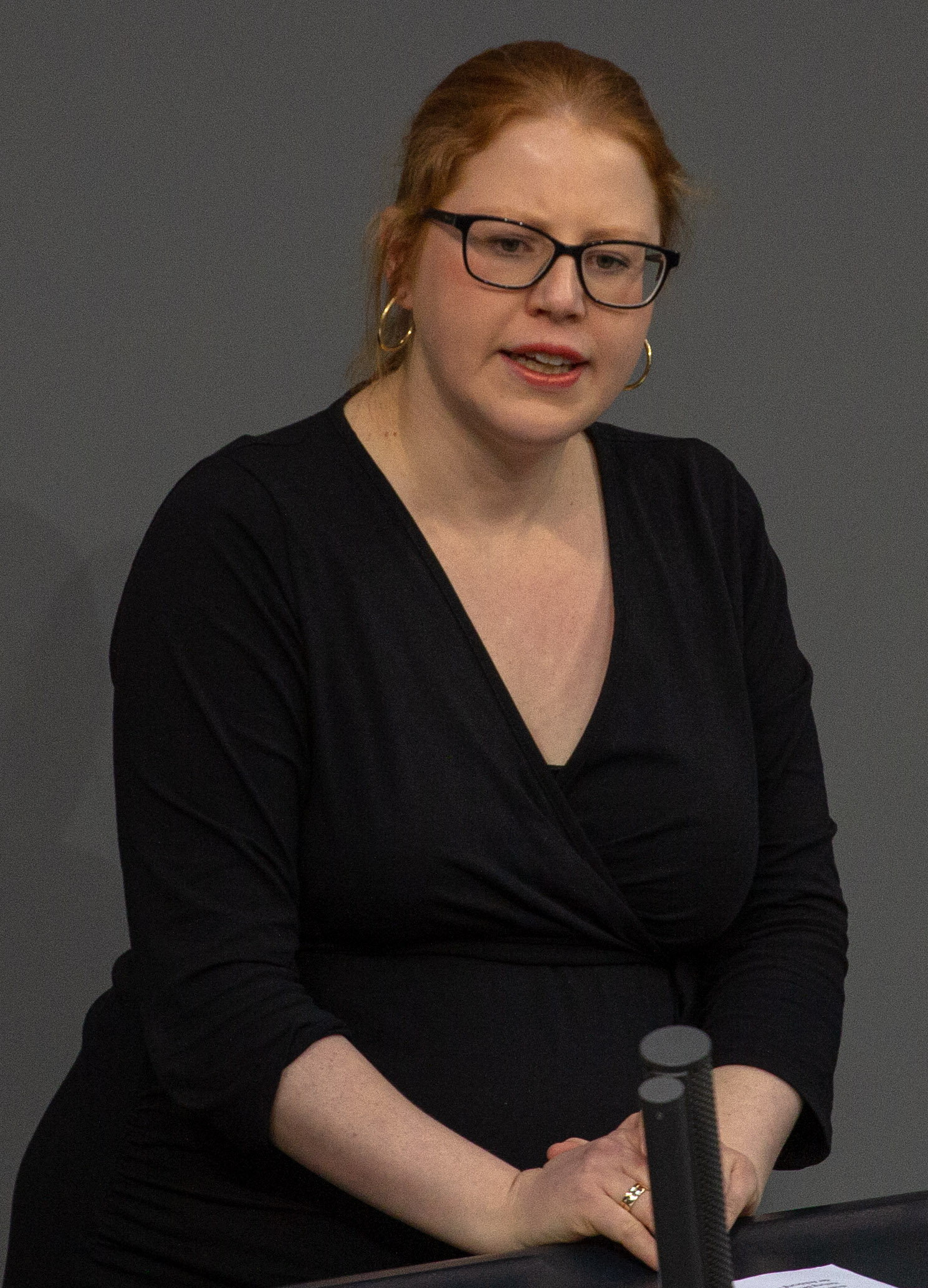 Katrin Helling-Plahr, Mitglied des Deutschen Bundestages, während einer Plenarsitzung am 11. April 2019 in Berlin.